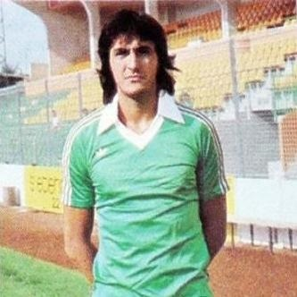 Jean-François Larios (1979), 'Francia Football' Panini figurina.